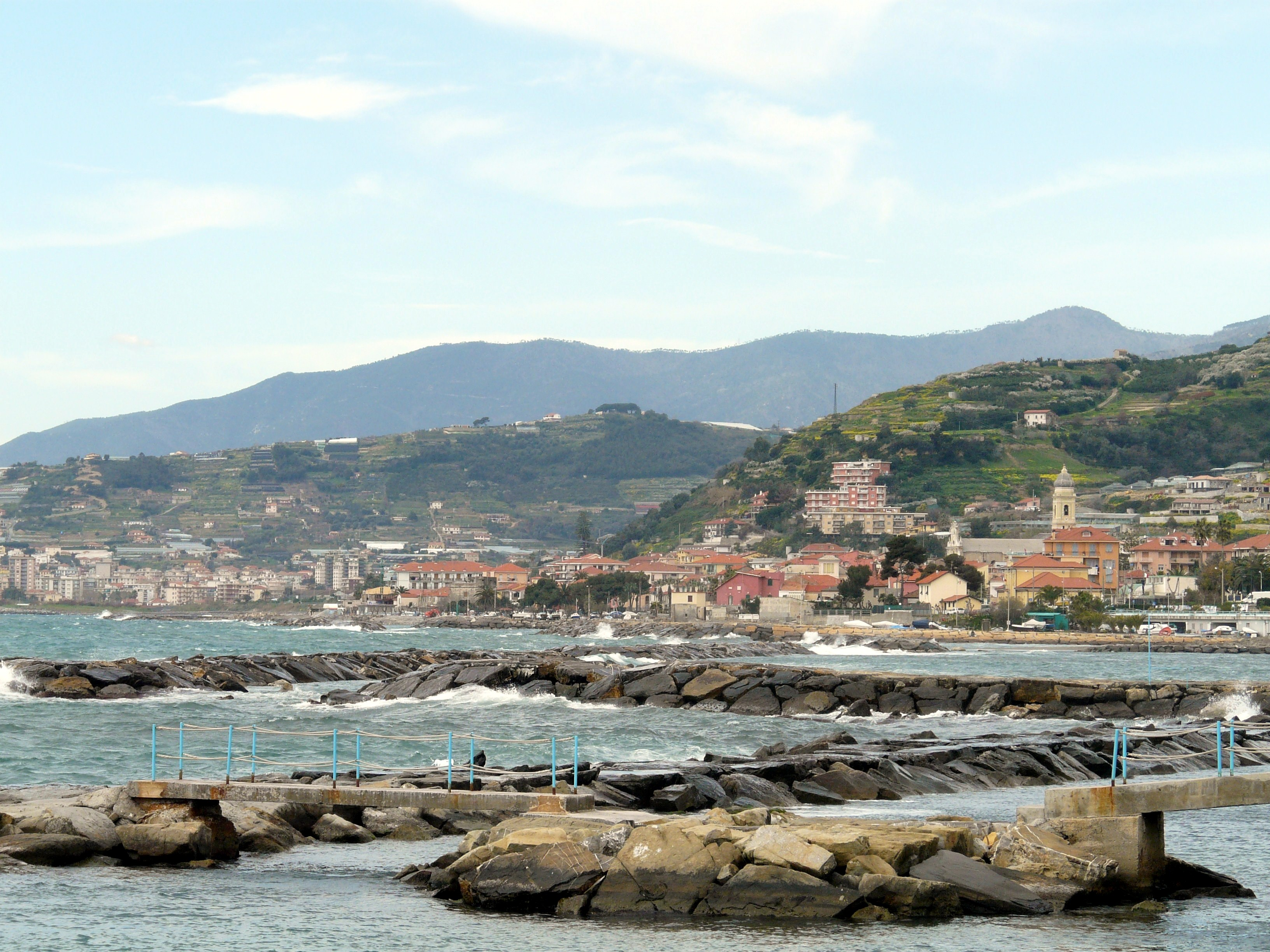 Riva Ligure, Liguria, Italia